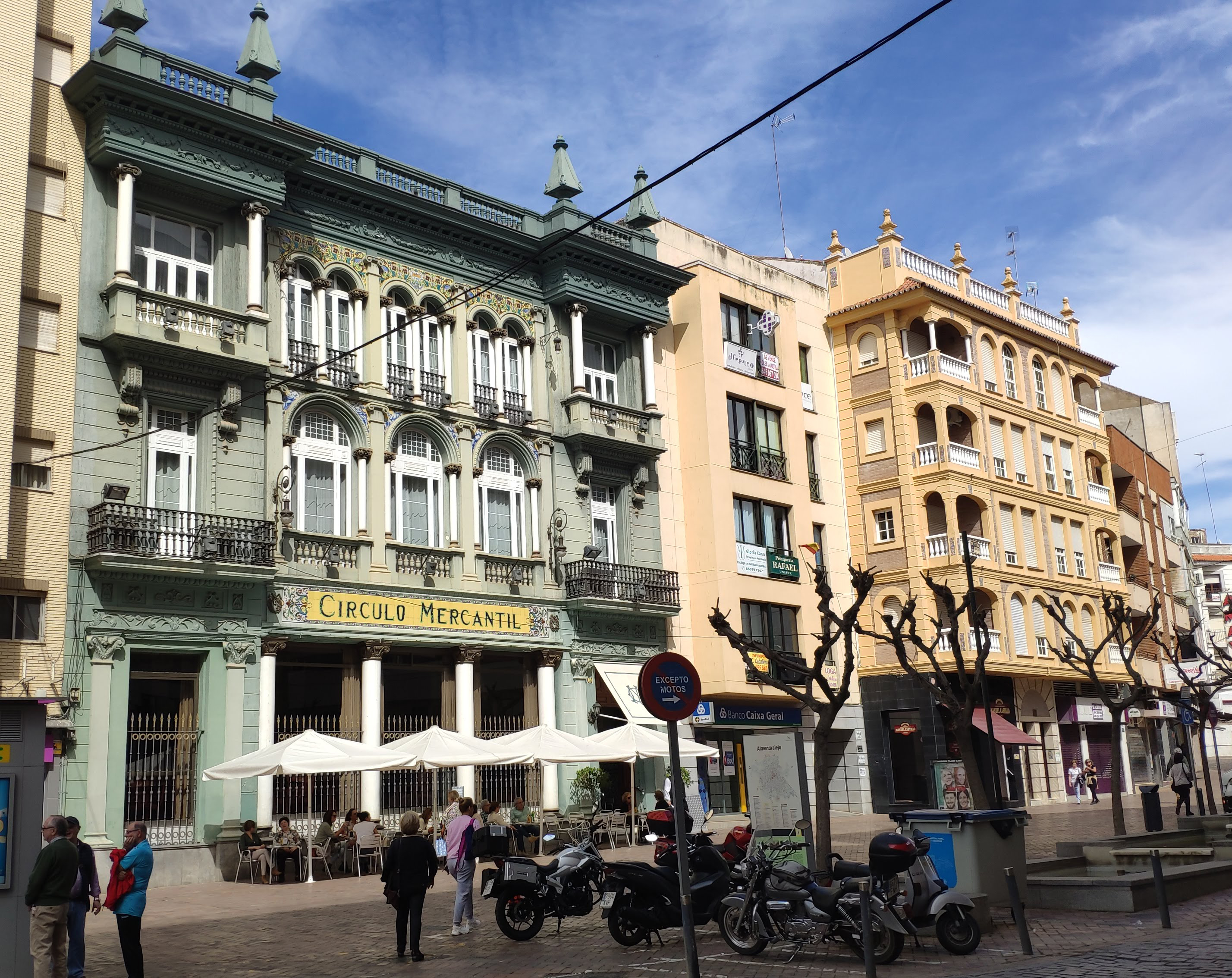 Sede social del Círculo Mercantil de Almendralejo